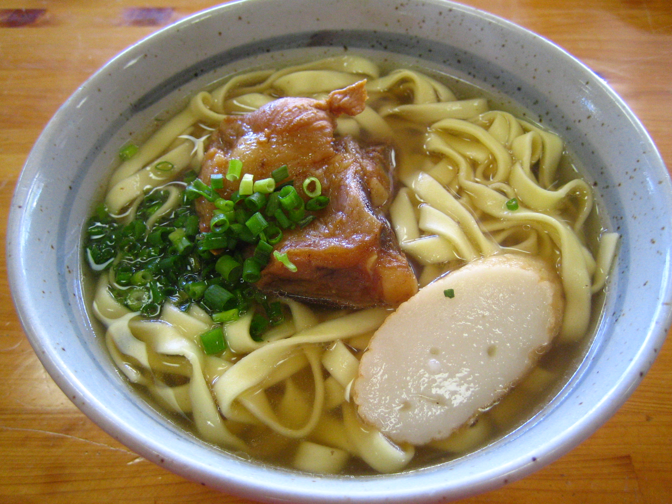 at Awase Soba, an okinawan noodle house, in Koza, Okinawaアワセそば